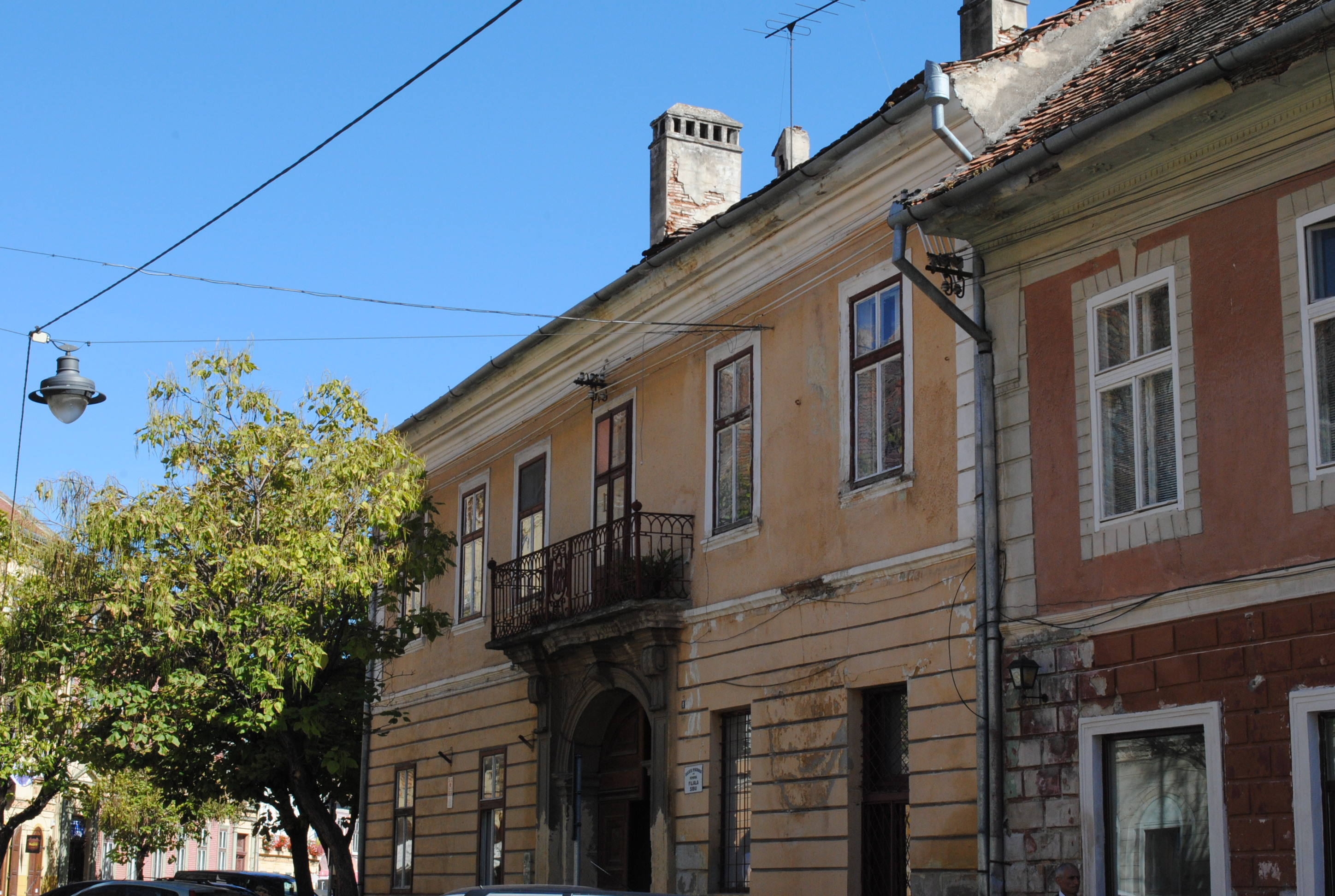 Casa Carol și Michael Brukenthal, sec. XV,1785 - 1799